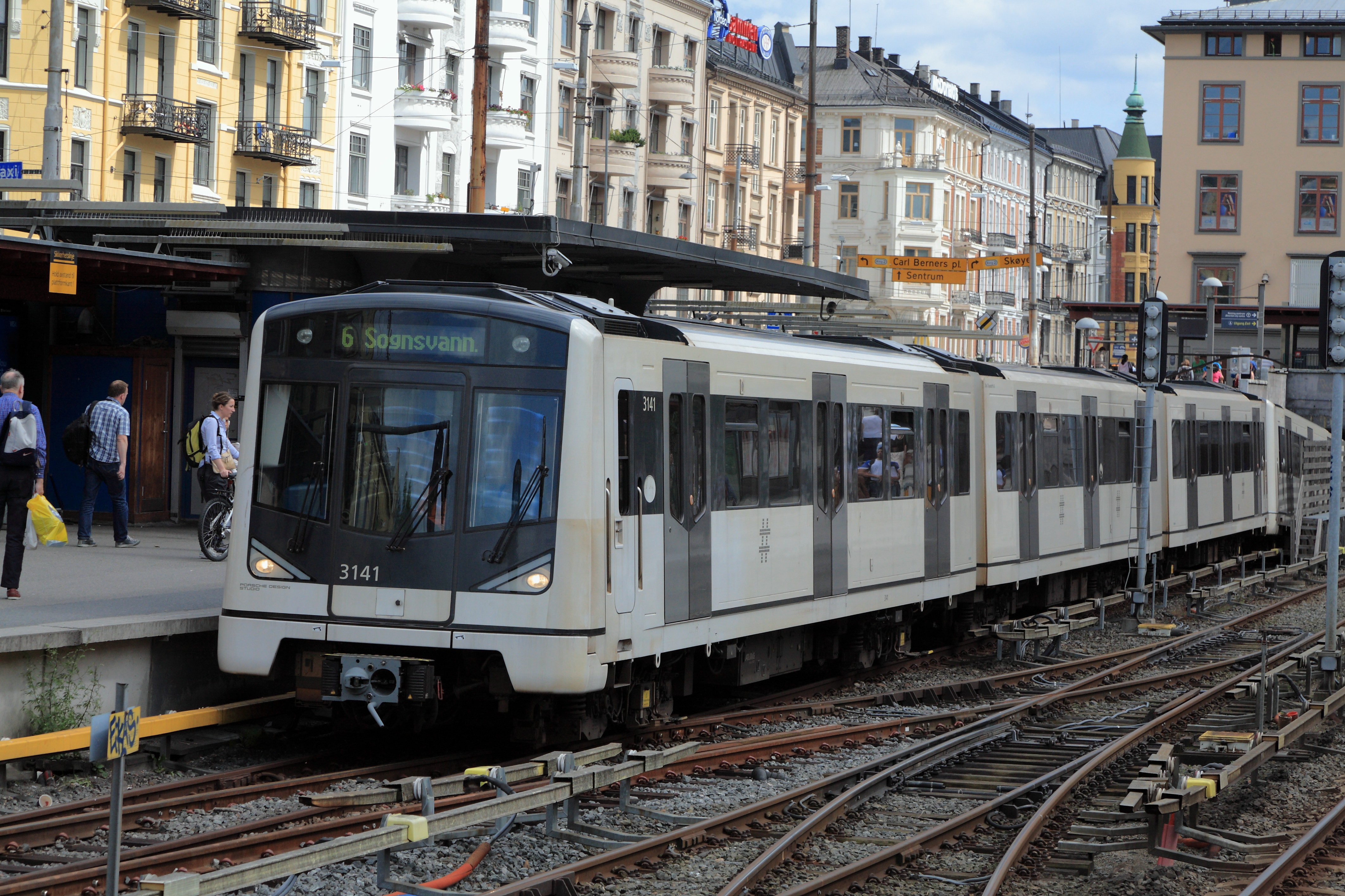 Zug der Linie 6 nach Sognsvann